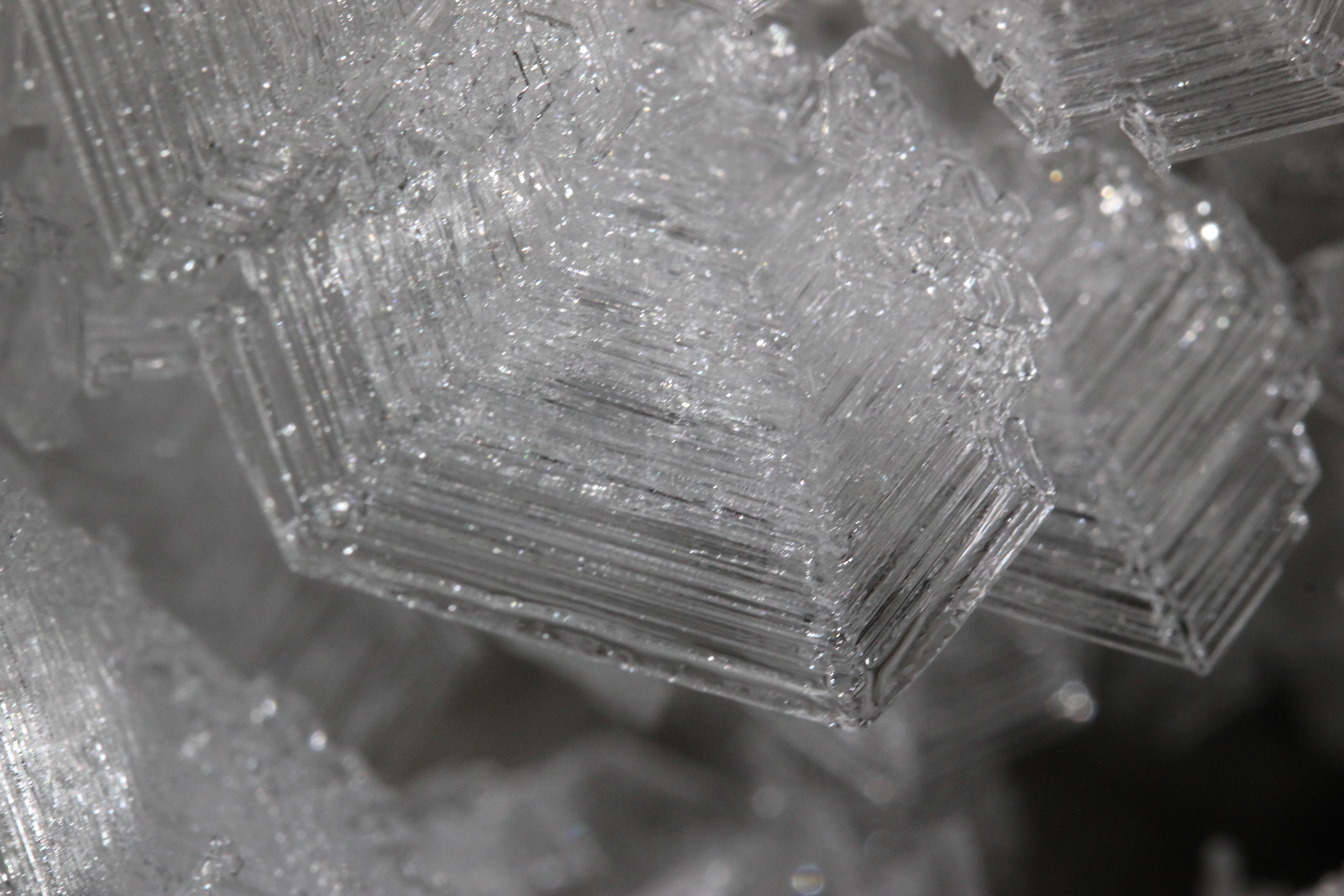 Eishöhle in Kungur